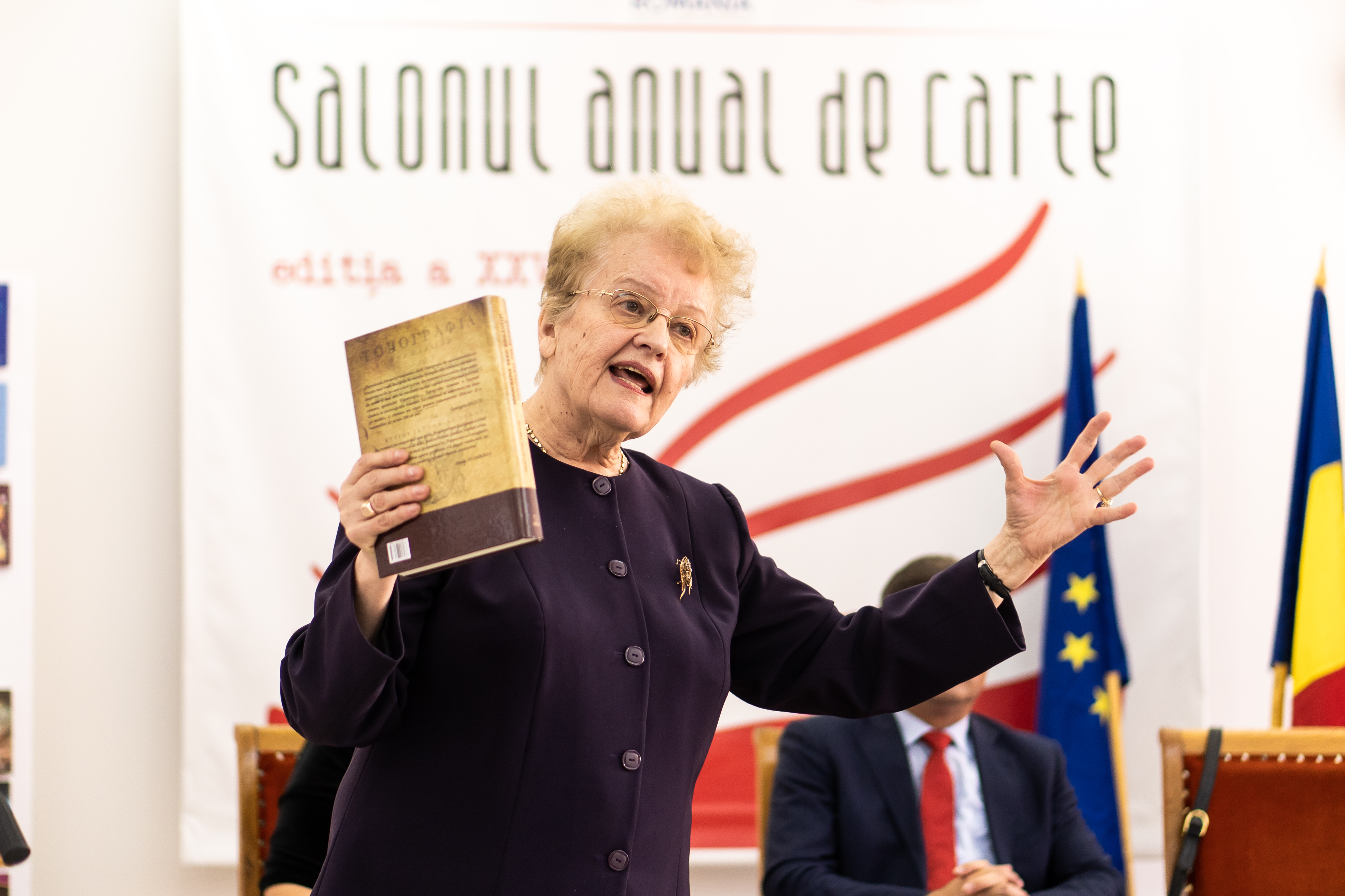 Georgeta Mariana Filitti în cadrul Salonului anual de carte Slobozia, ediția a XXVII-a. 17 noiembrie 2018